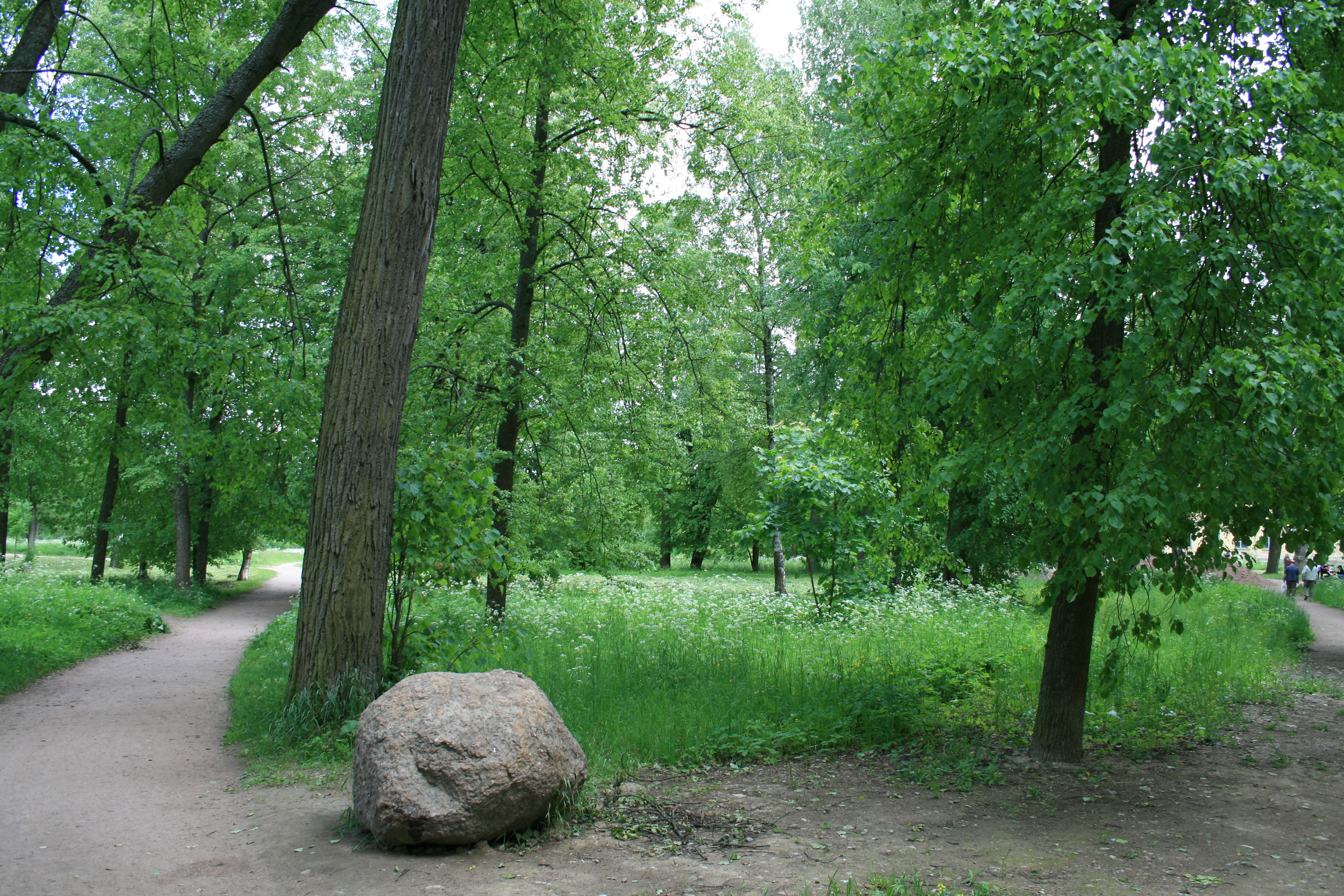 Дорожки Александровского сада